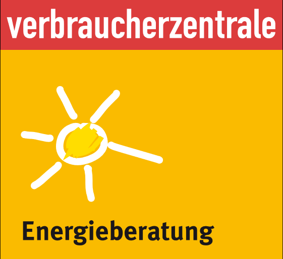 Projektlogo Verbraucherzentrale Energieberatung